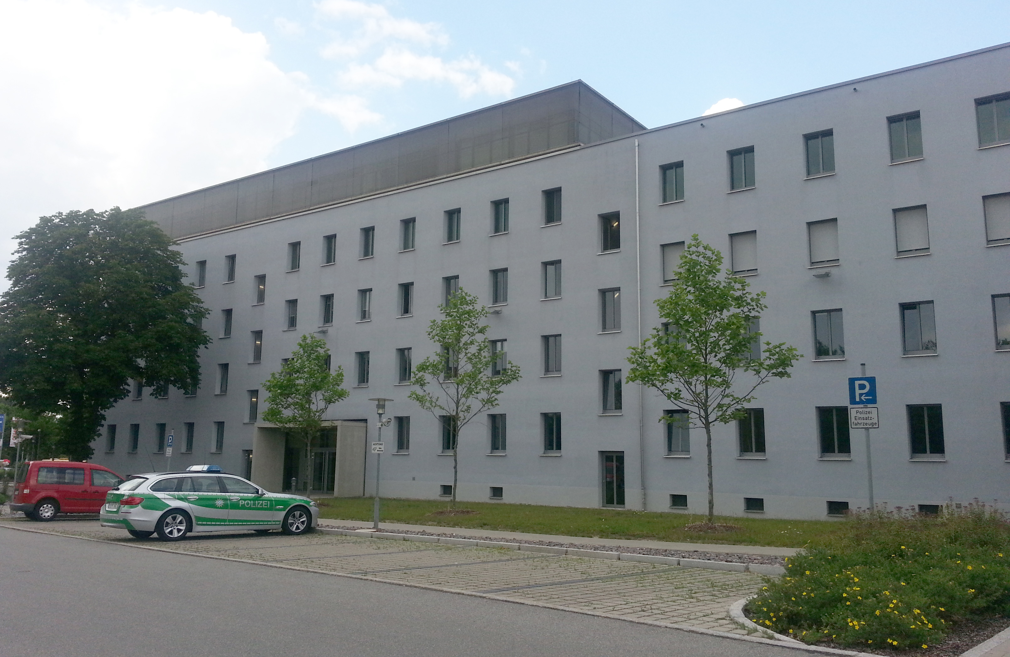 Polizeipräsidium Oberpfalz, 93053 Regensburg, Bajuwarenstraße 2c